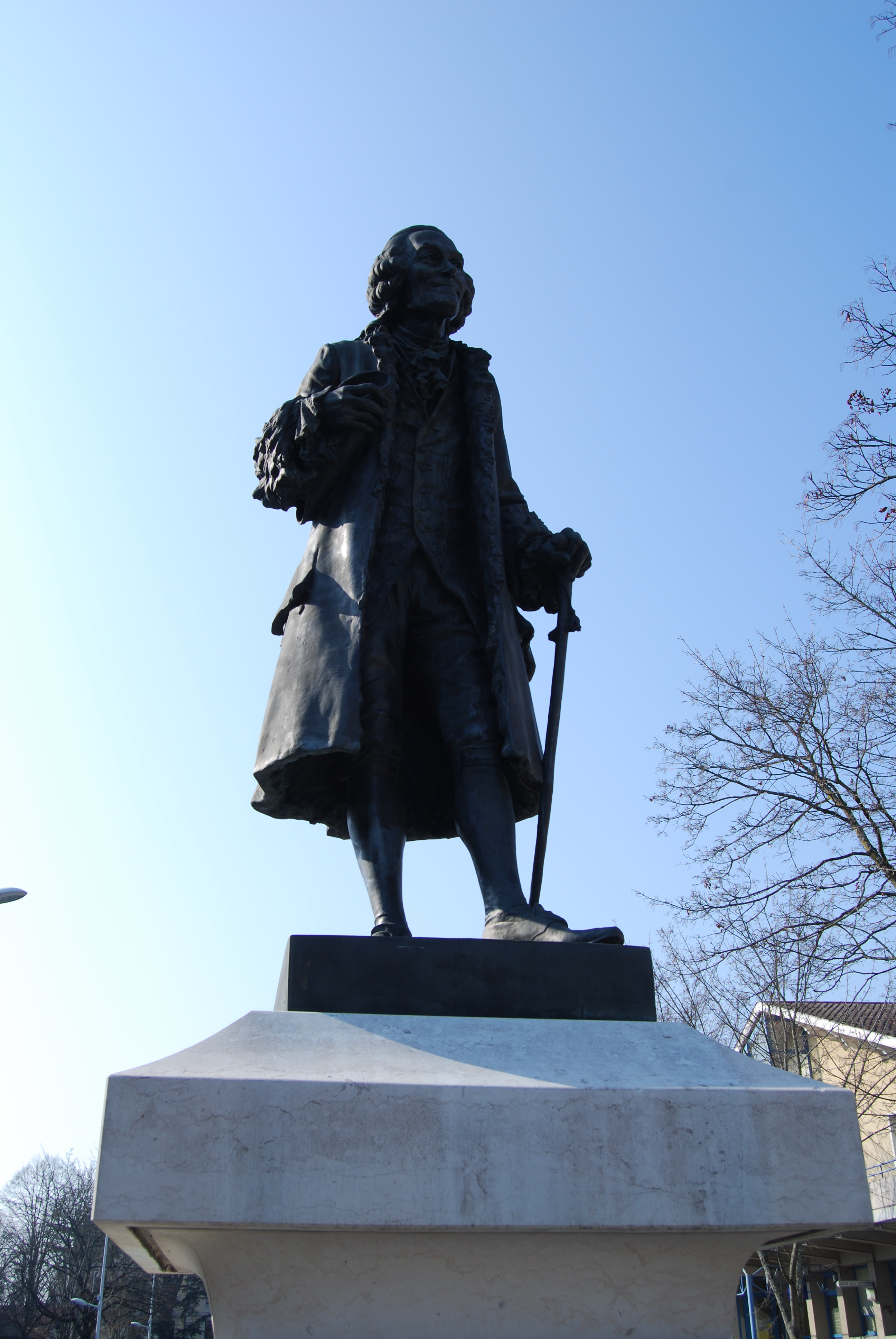 Statue de Voltaire à Ferney-Voltaire, Ain, France